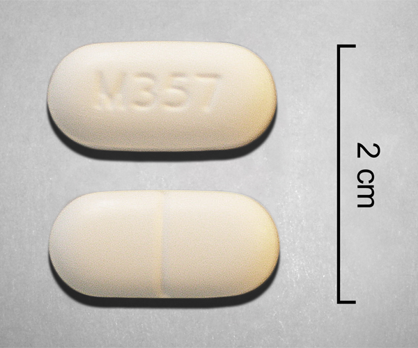 Hydrocodone/Paracetamol 5-500 tablet (Mallinckrodt).